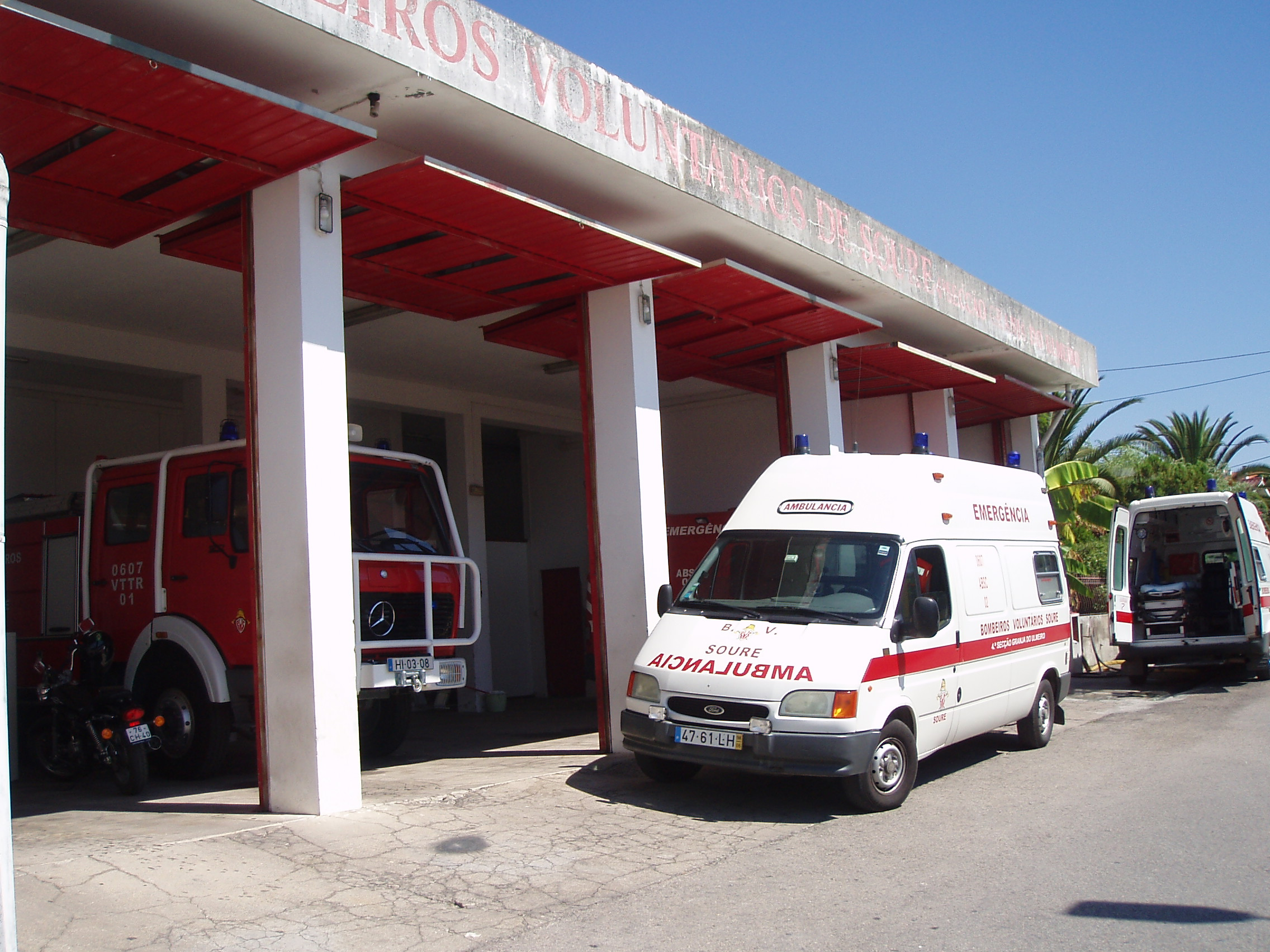 Vista Parcial do Quartel da 4ª Secção dos Bombeiros Voluntários de Soure.